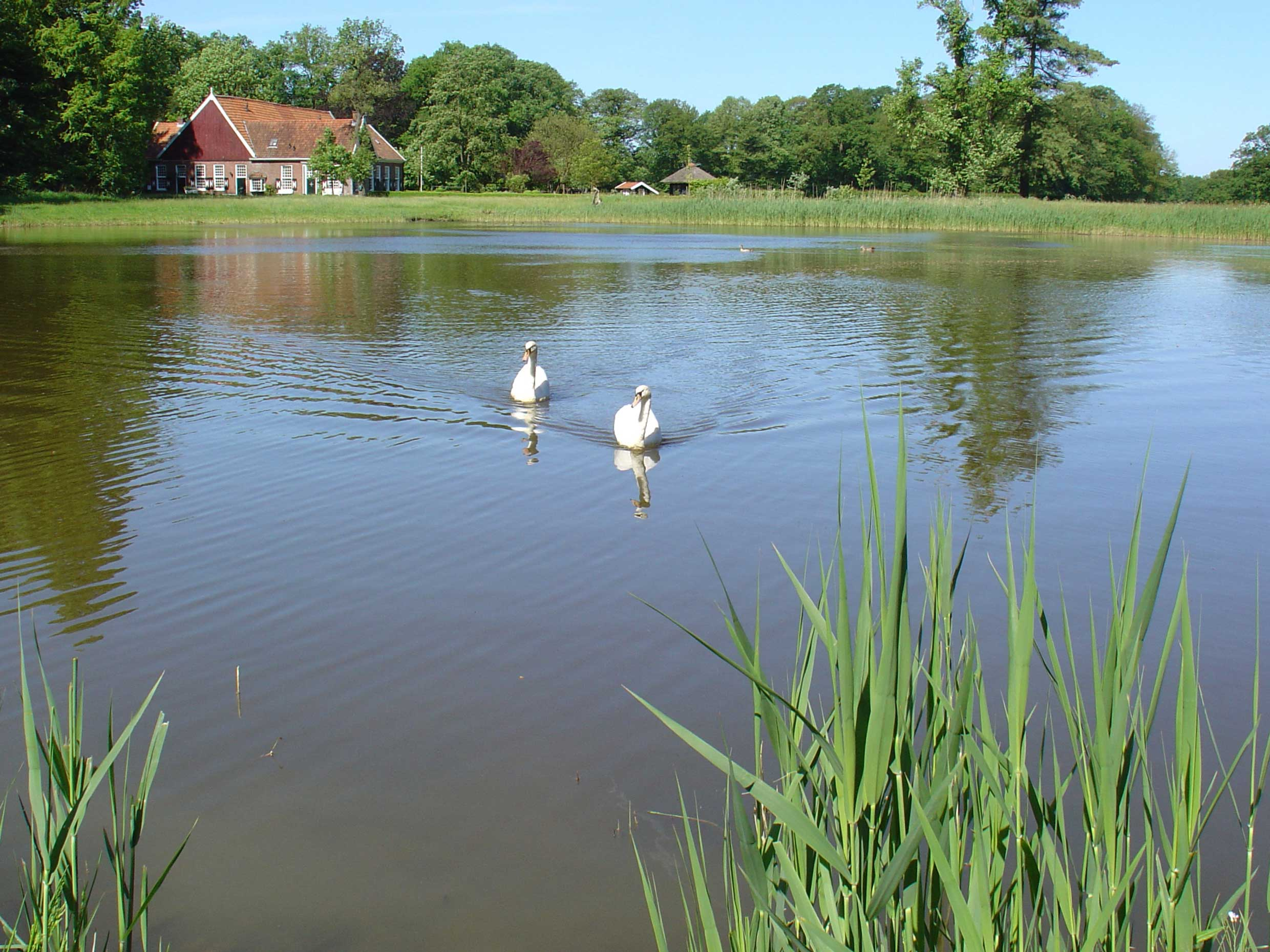 Landgoed Smalenbroek natuurgebied ten zuiden van Enschede